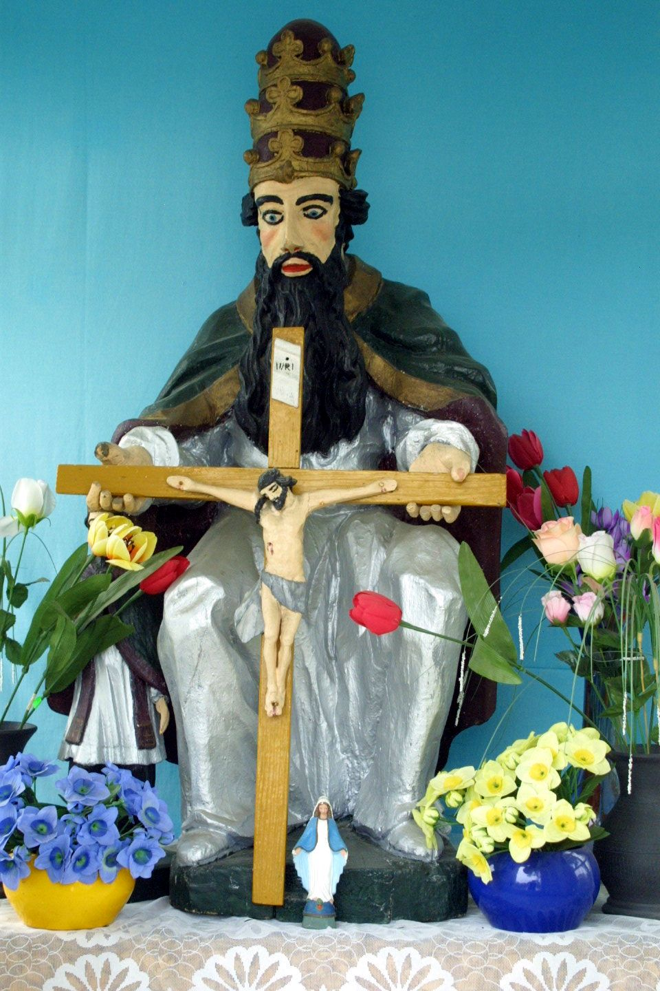 Kosów Lacki. Tron Łaski. Barokowo-ludowa rzeźba w kapliczce przydrożnej.